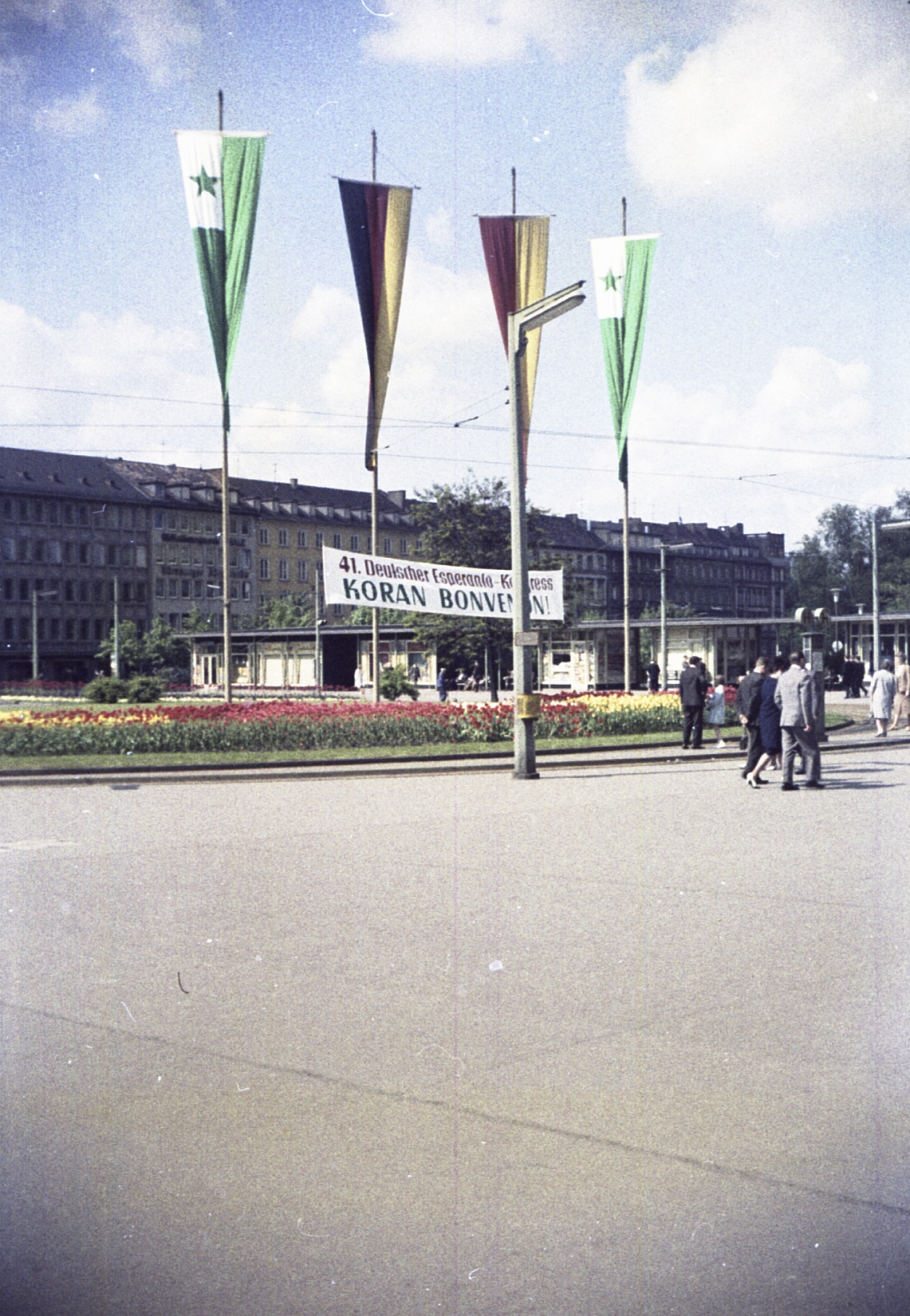 Begrüßung zum 41. deutschen Esperantokongress in Würzburg vor dem Bahnhof